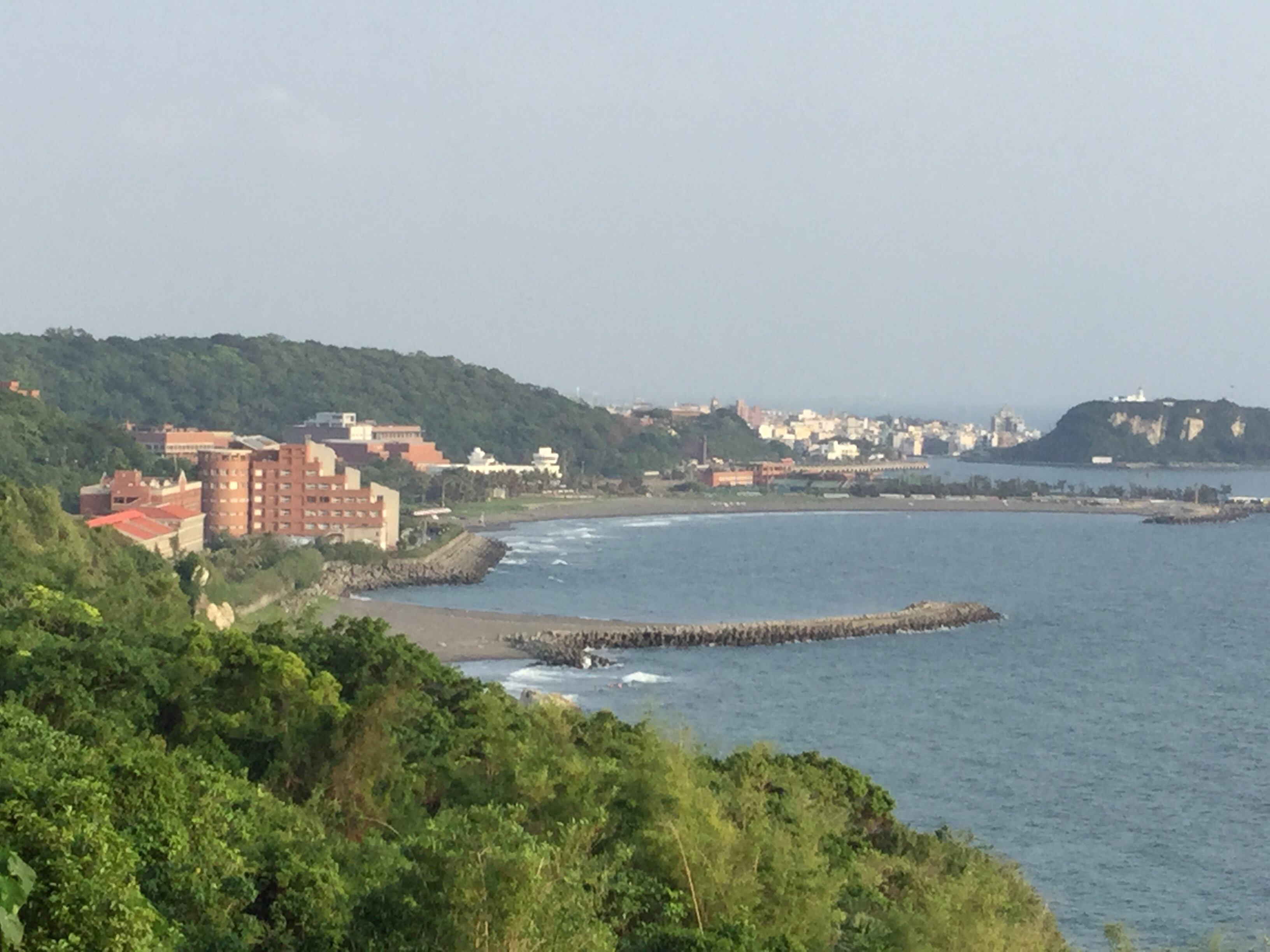 國立中山大學海洋科學學院